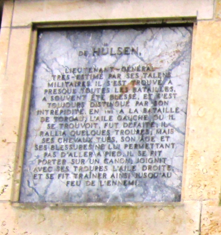 Ehrentafel für Johann Dietrich von Hülsen (1693-1767) am Obelisken in Rheinsberg